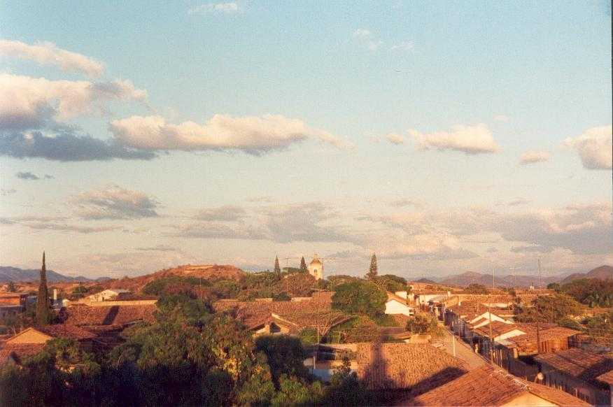 Vista general de Ocotal Nicaragua América Central (1988).